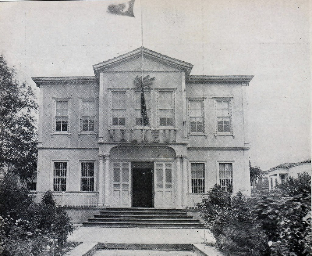 Eskiden Halkevi olarak kullanılan ve günümüze kadar gelemeyen bina. Bugün Samsun Sağlık Genel Müdürlüğü'nün arkasında kalan arsada bulunmaktaydı.